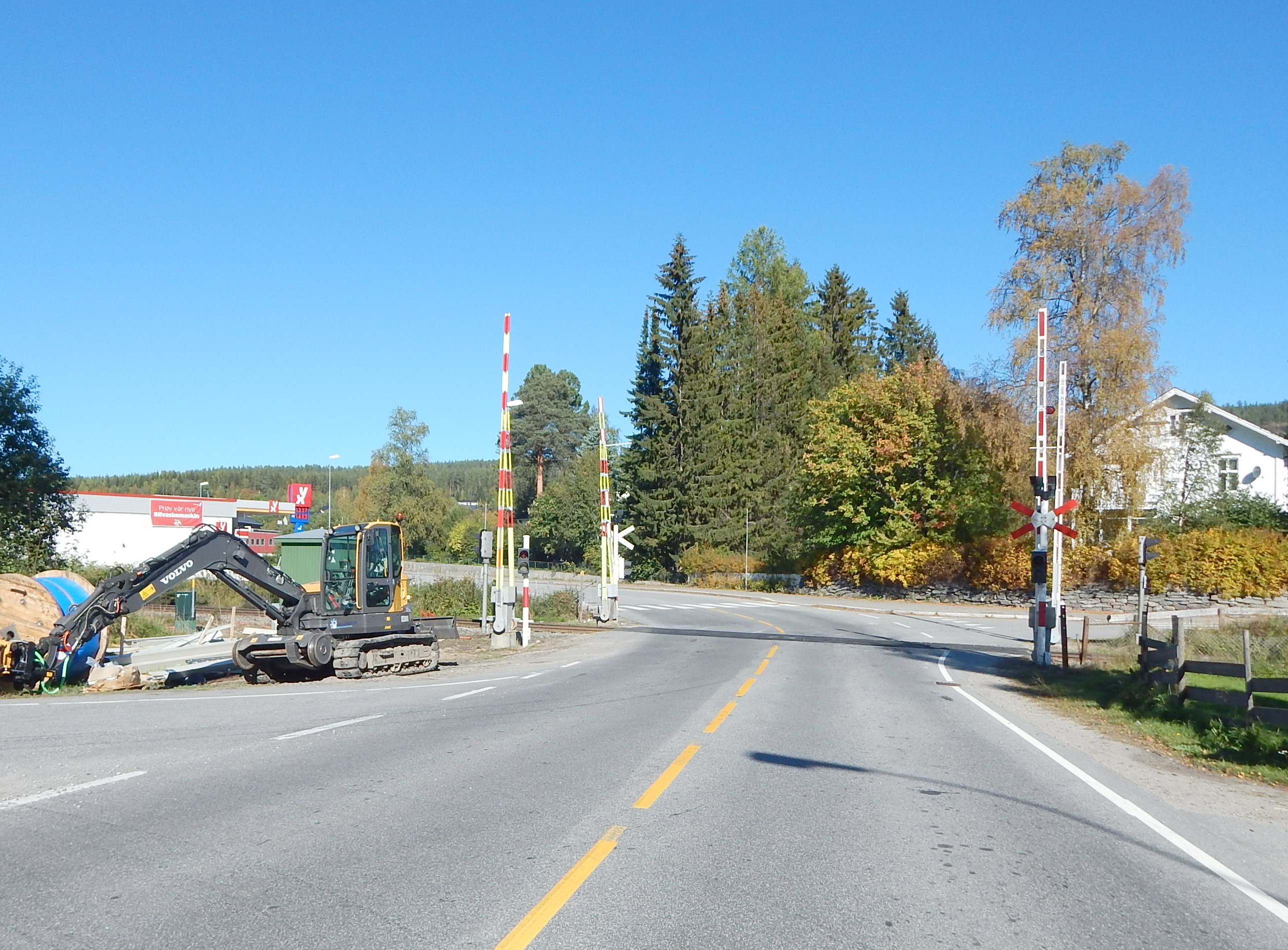 Fylkesvei 30 på planovergang over Rørosbanen ved Koppang